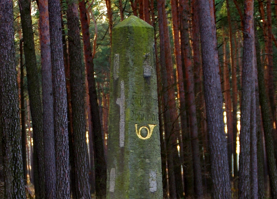 Hohenbucko in Brandenburg. Die Postmailensäule steht an der Schliebener Straße am südlichen Ortsausgang.